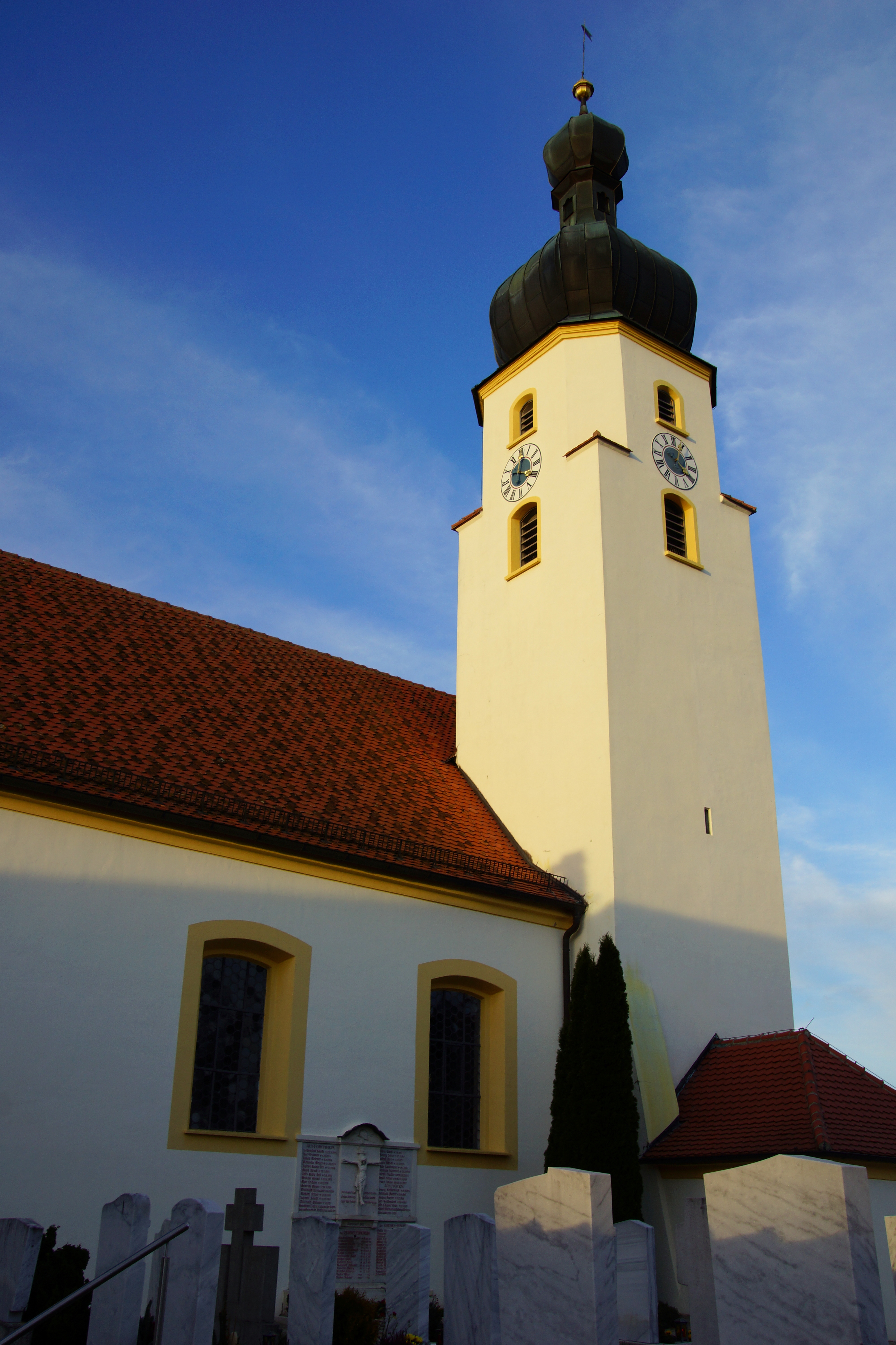 Die Pfarrkirche St. Ägidius in Forchheim bei Freystadt in der Oberpfalz